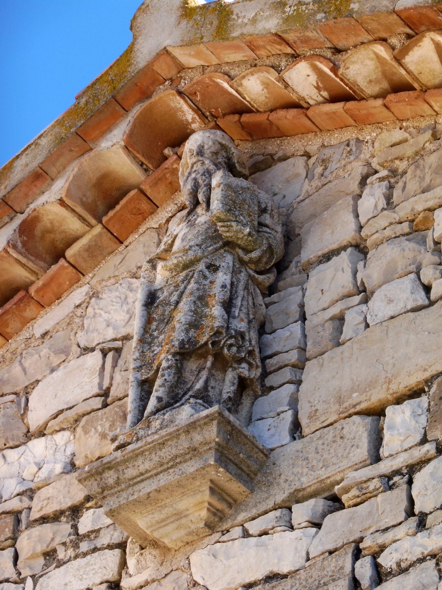 Església parroquial de Santa Maria de la Guàrdia Lada (Montoliu de Segarra): escultura a la façana